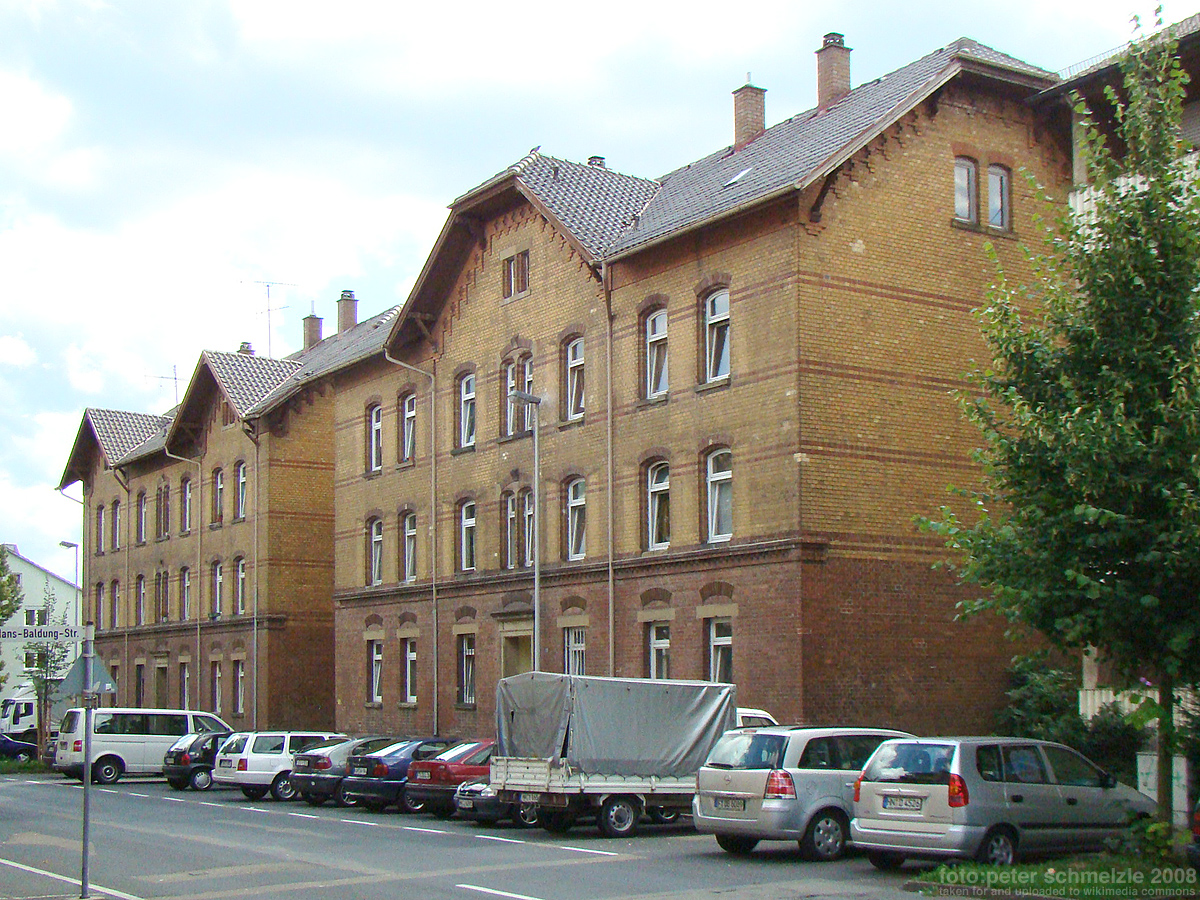 Denkmalgeschützte Eisenbahn-Wohnhäuser in der Großgartacher Straße 21 und 23 in Heilbronn-Böckingen